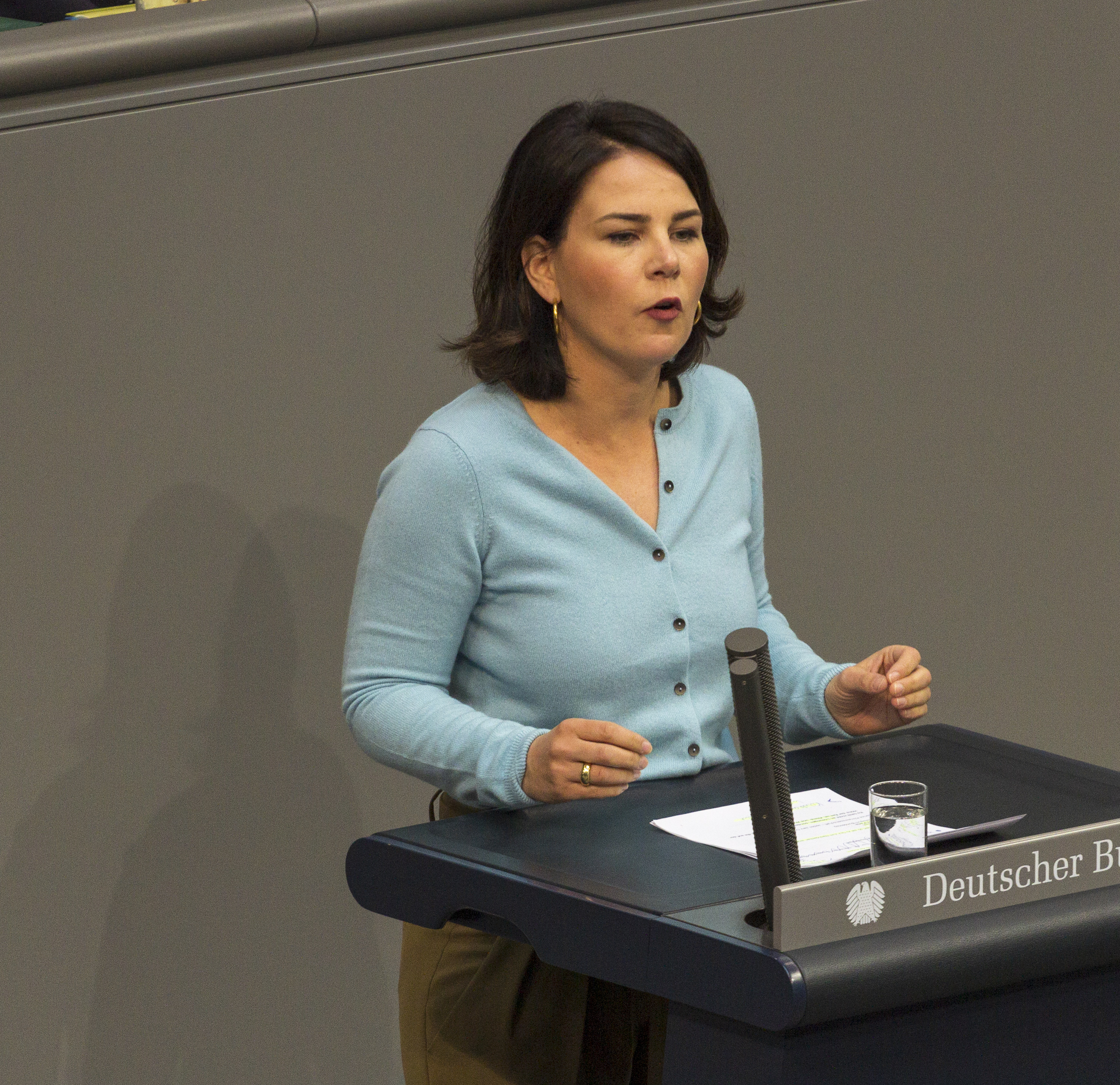 Plenarsitzung des Deutschen Bundestages am 9. Mai 2019 in Berlin.